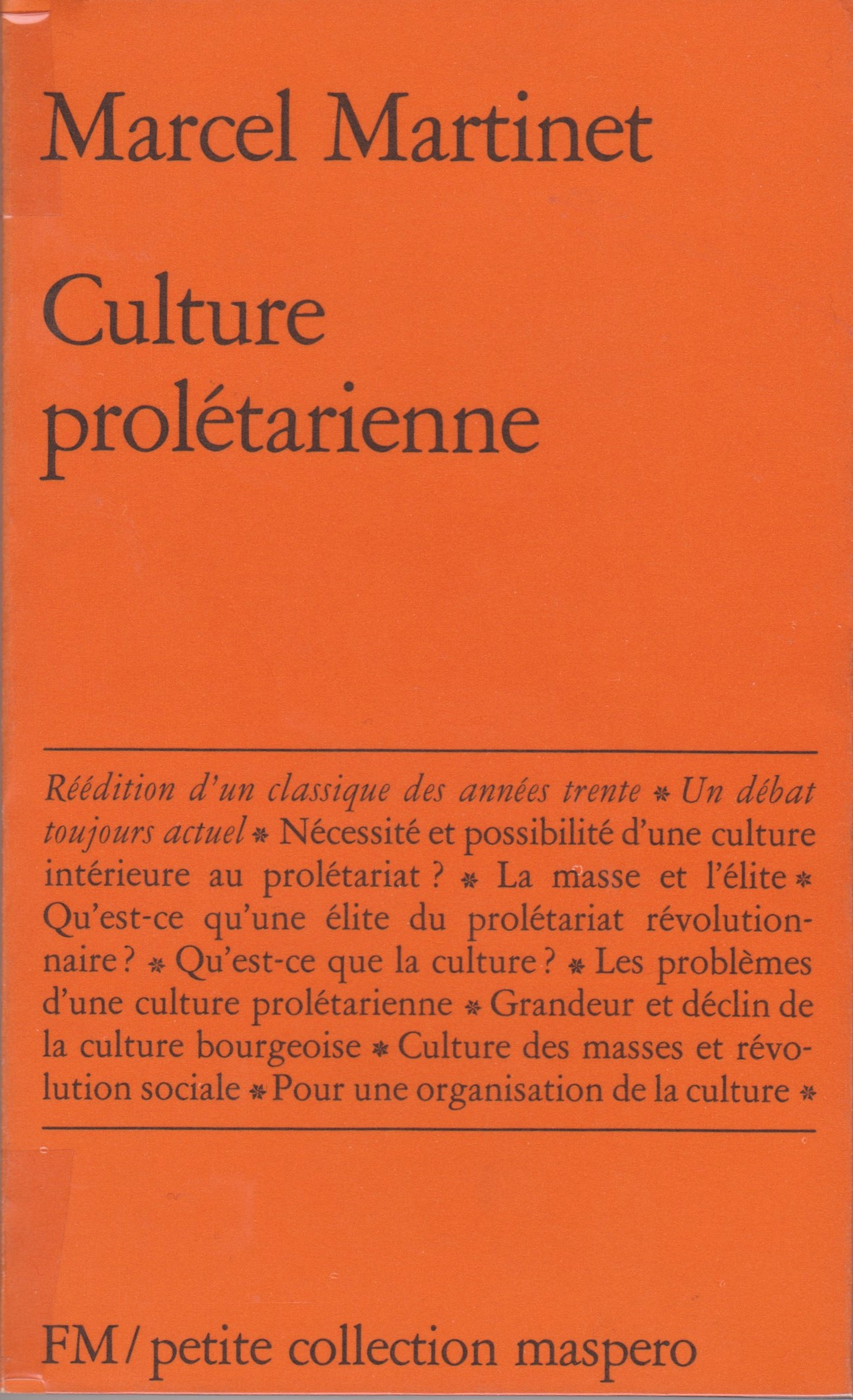 Premier plat de couverture du livre Culture prolétarienne", réédité en 1976 par les éditions Maspero